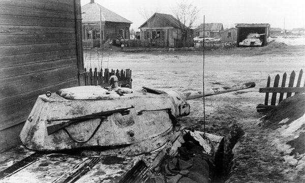 Советские танки в засаде подо Ржевом